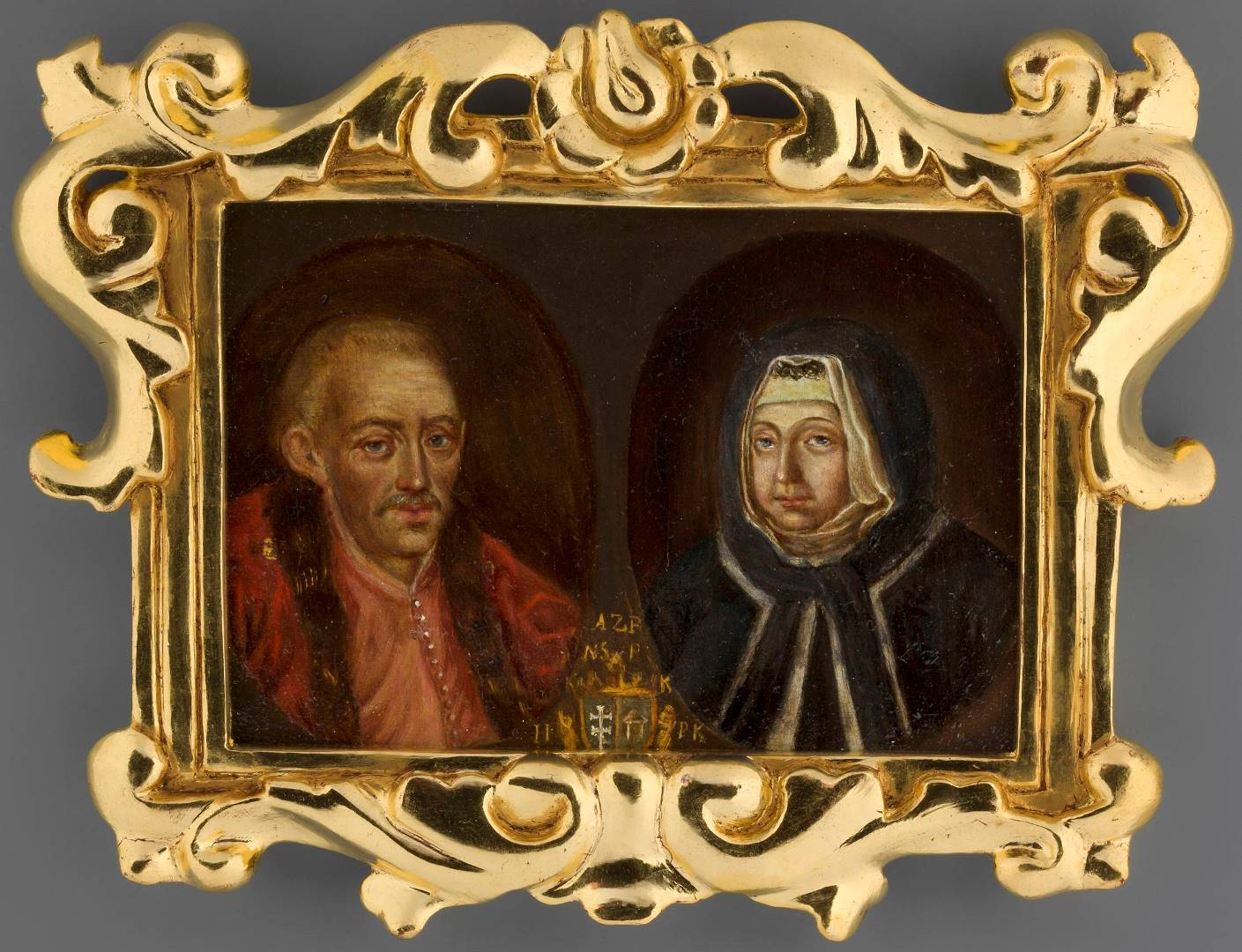 портрет дідича Станиславова Анджея Потоцкого та його дружини Анни з Рисіньских